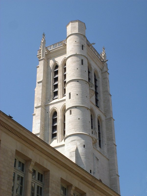 Tour Clovis à Paris, Ve arrondissement, vue de la rue Clovis. Tour de ancienne église de l'abbaye Sainte-Geneviève (aujourd'hui lycée Henri-IV).